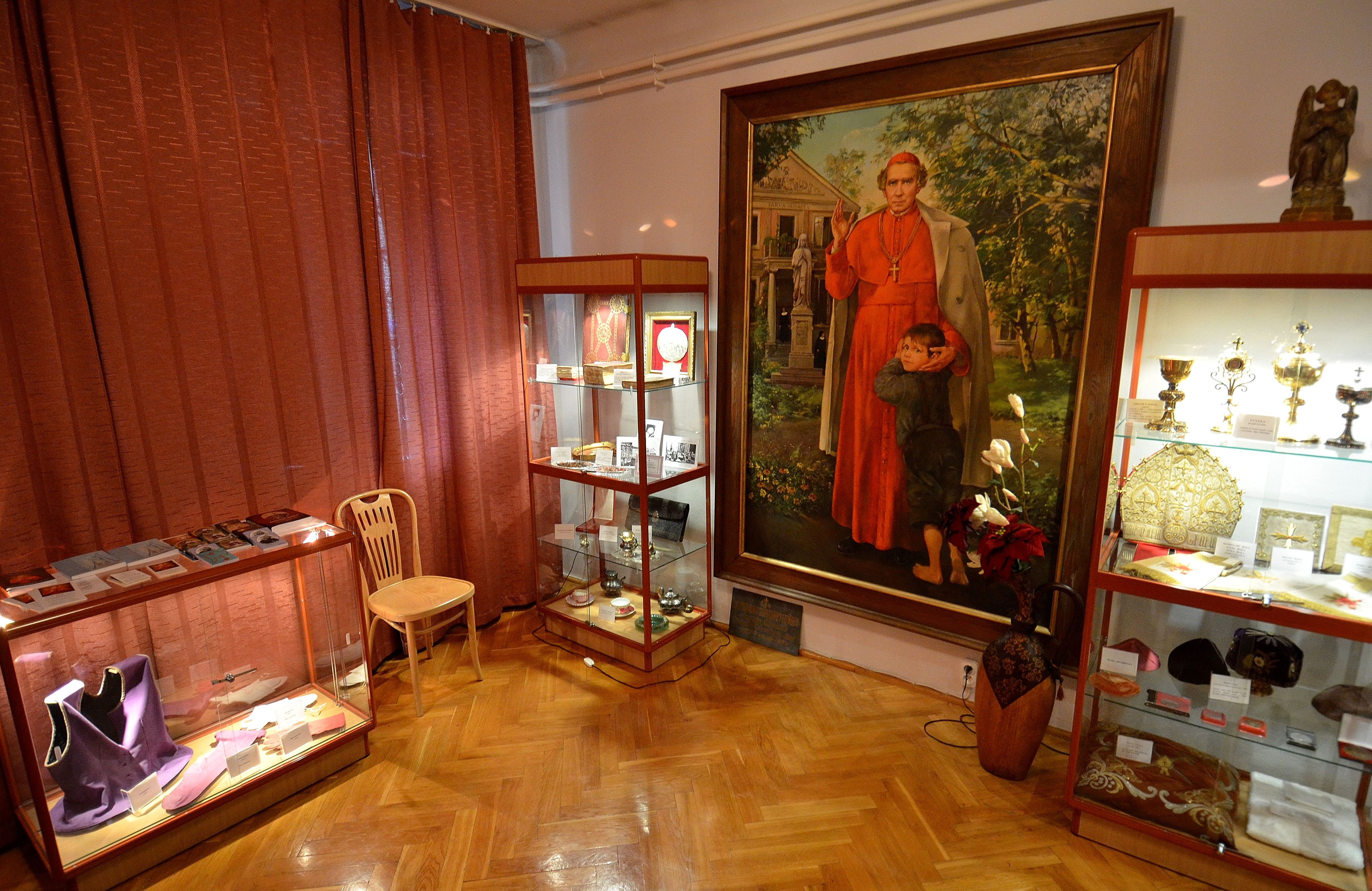 Izba Pamięci Zygmunta Szczęsnego Felińskiego w Pałacyku Bogusławskiego (Zgromadzenie Sióstr Franciszkanek Rodziny Maryi) w Warszawie